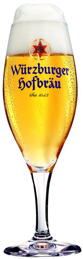 Glass of German "Würzburger Hofbräu" beer